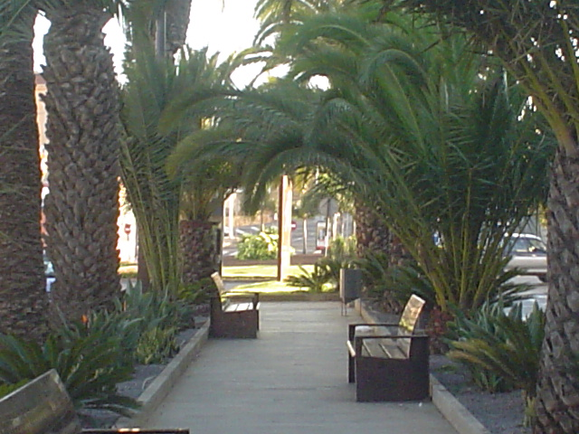 Av. Las Palmeras (entrada)